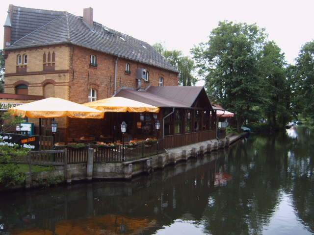 Haus in Schlepzig, Land Brandenburg, Deutschland Bild aufgenommen am 28.6.2006 durch Olaf Meister